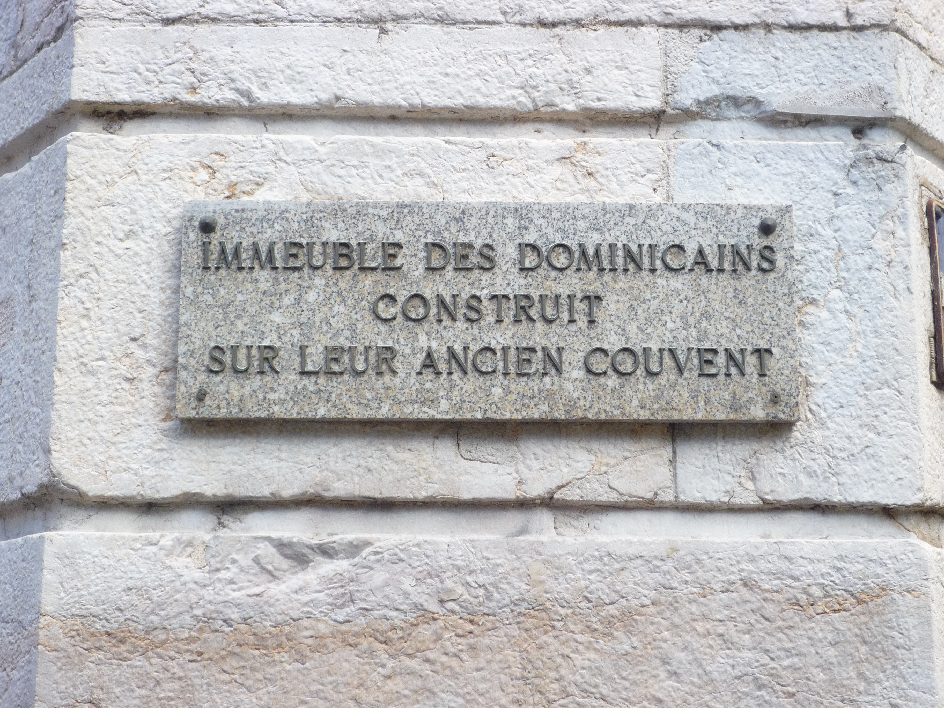 Plaque rappelant le site du couvent des Dominicains à Grenoble. Angle rues Philis de la Charce et Raoul Blanchard.